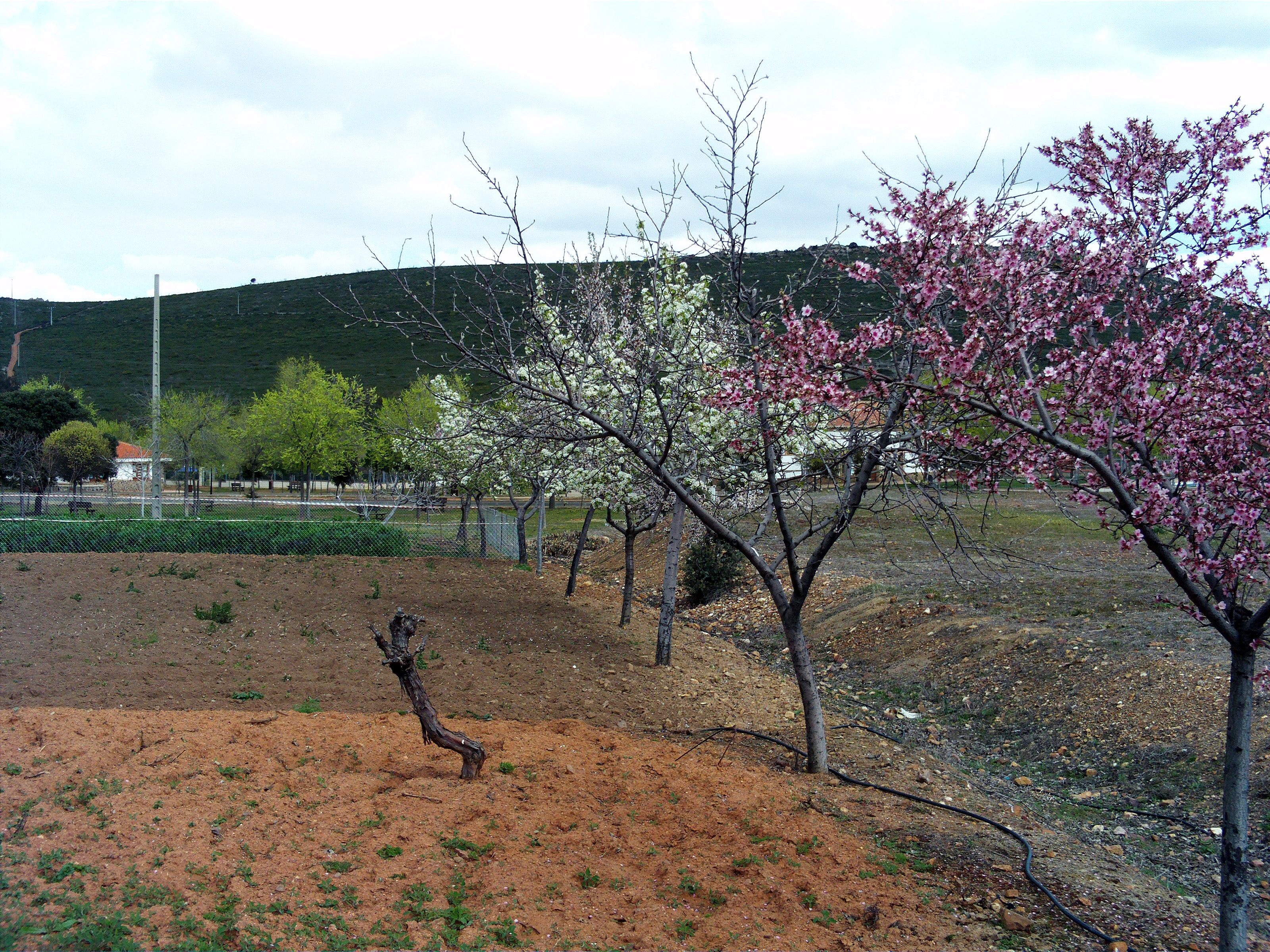 Orchard in Dehesa Boyal de Puertollano, Puertollano, Ciudad Real, Spain